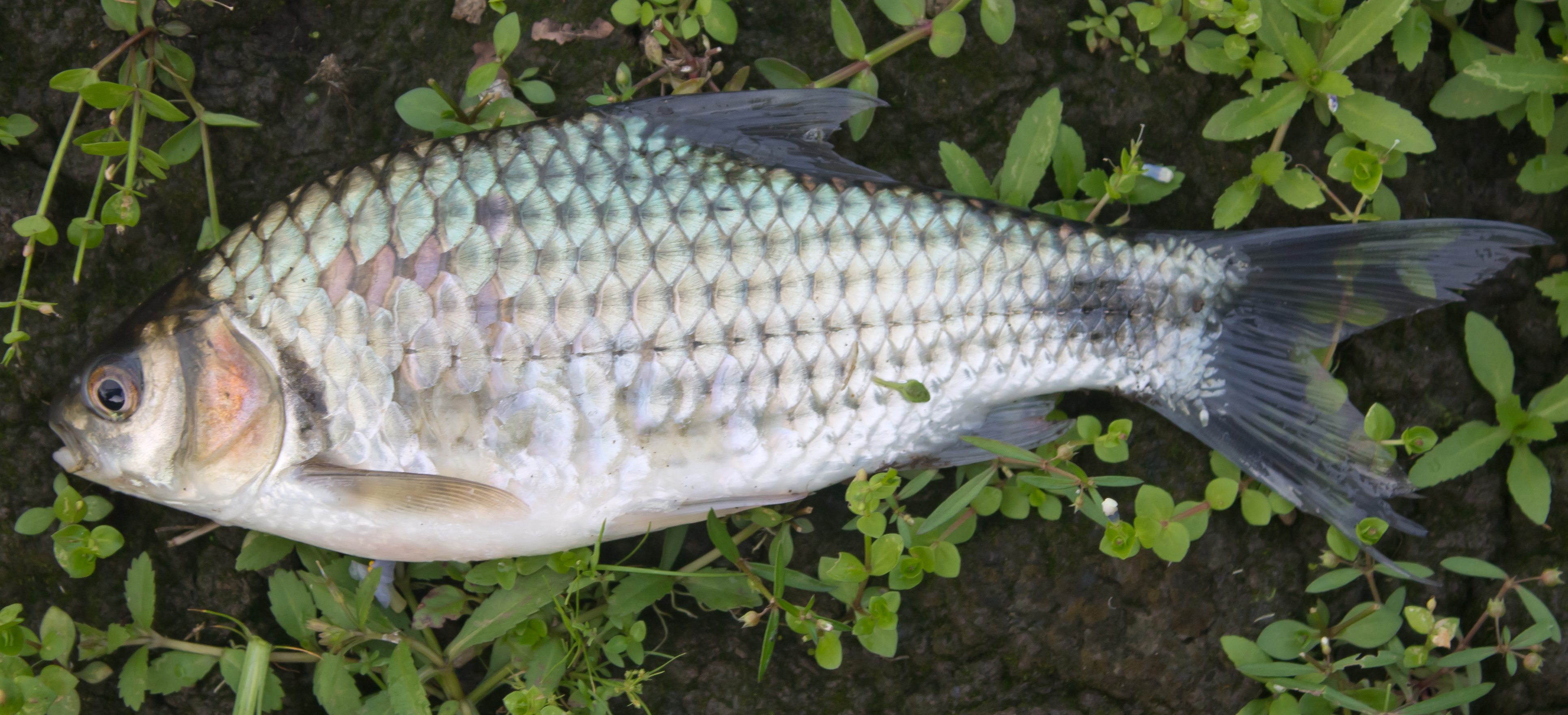 കുറുവ മത്സ്യം